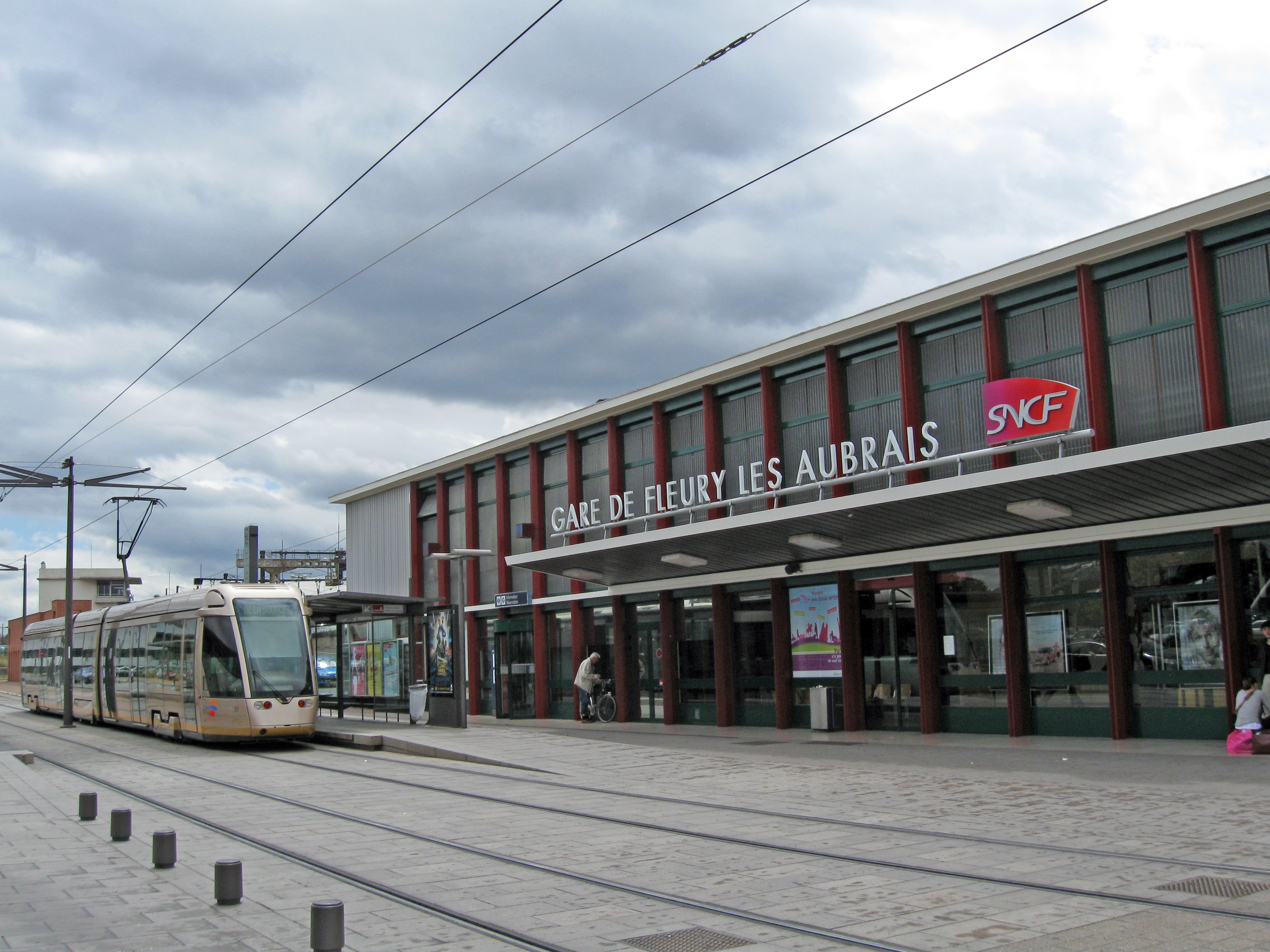 Gare SNCF de Fleury-les-Aubrais et tramway d'Orléans, Fleury-les-Aubrais, Loiret, France